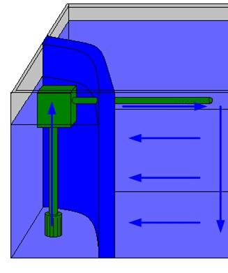 Beschreibung: Schematische Darstellung eines Hamburger Mattenfilters Quelle: Selbst gezeichnet Fotograf oder Zeichner: NiKo Lizenzstatus: Public Domain